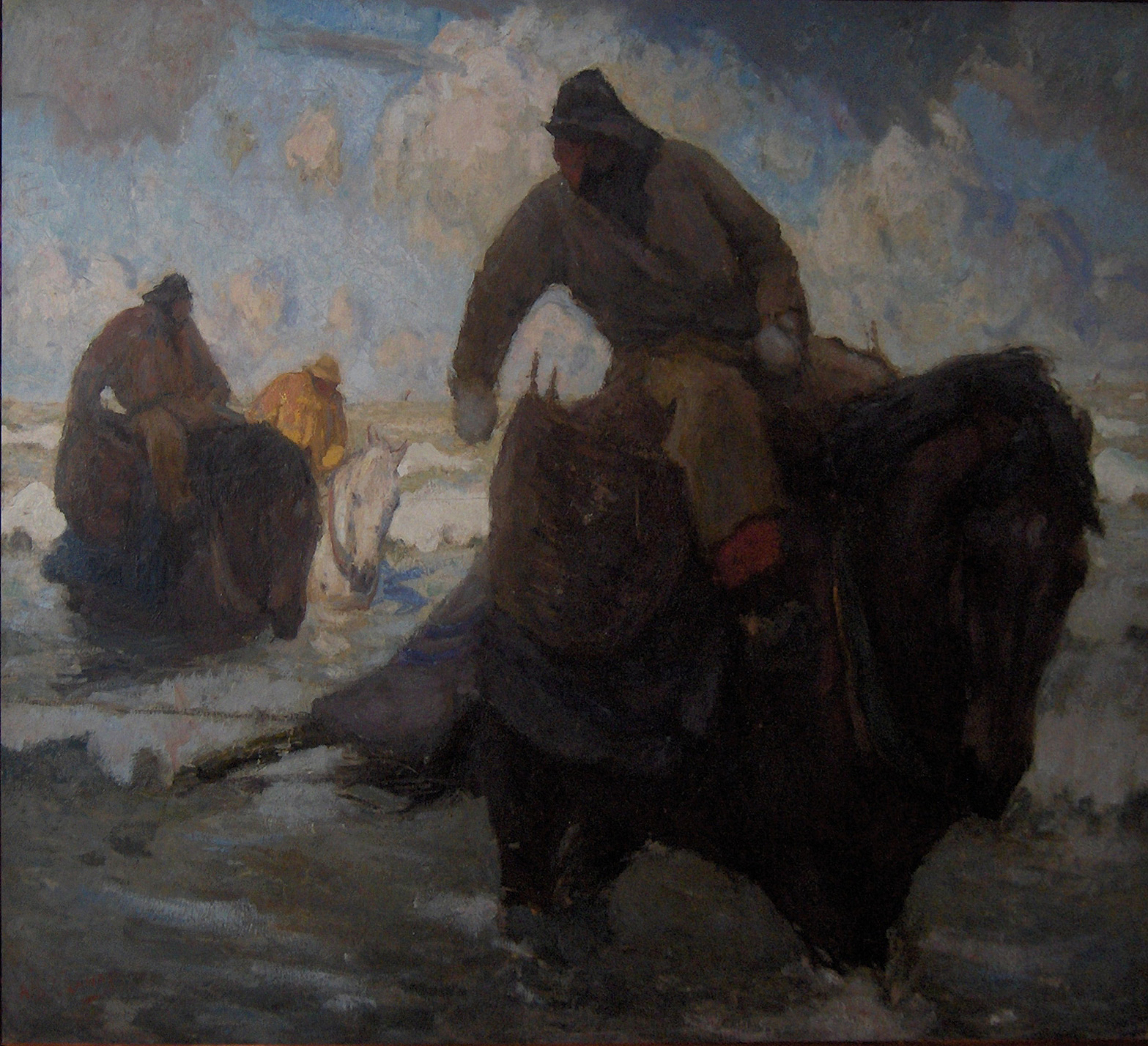 "De garnalenvissers", schilderij door Albert Crahay (1881-1914)